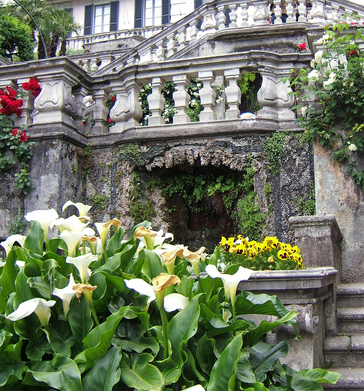 Villa Carlotta in Tremezzo, lake Como, staircase